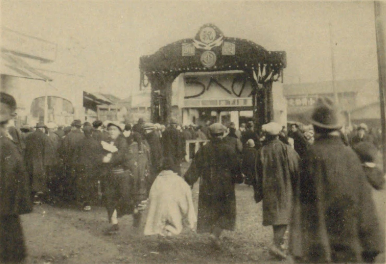 1927年（昭和2年）12月30日の東京地下鉄道（現・東京地下鉄）銀座線上野駅の開業初日の様子。